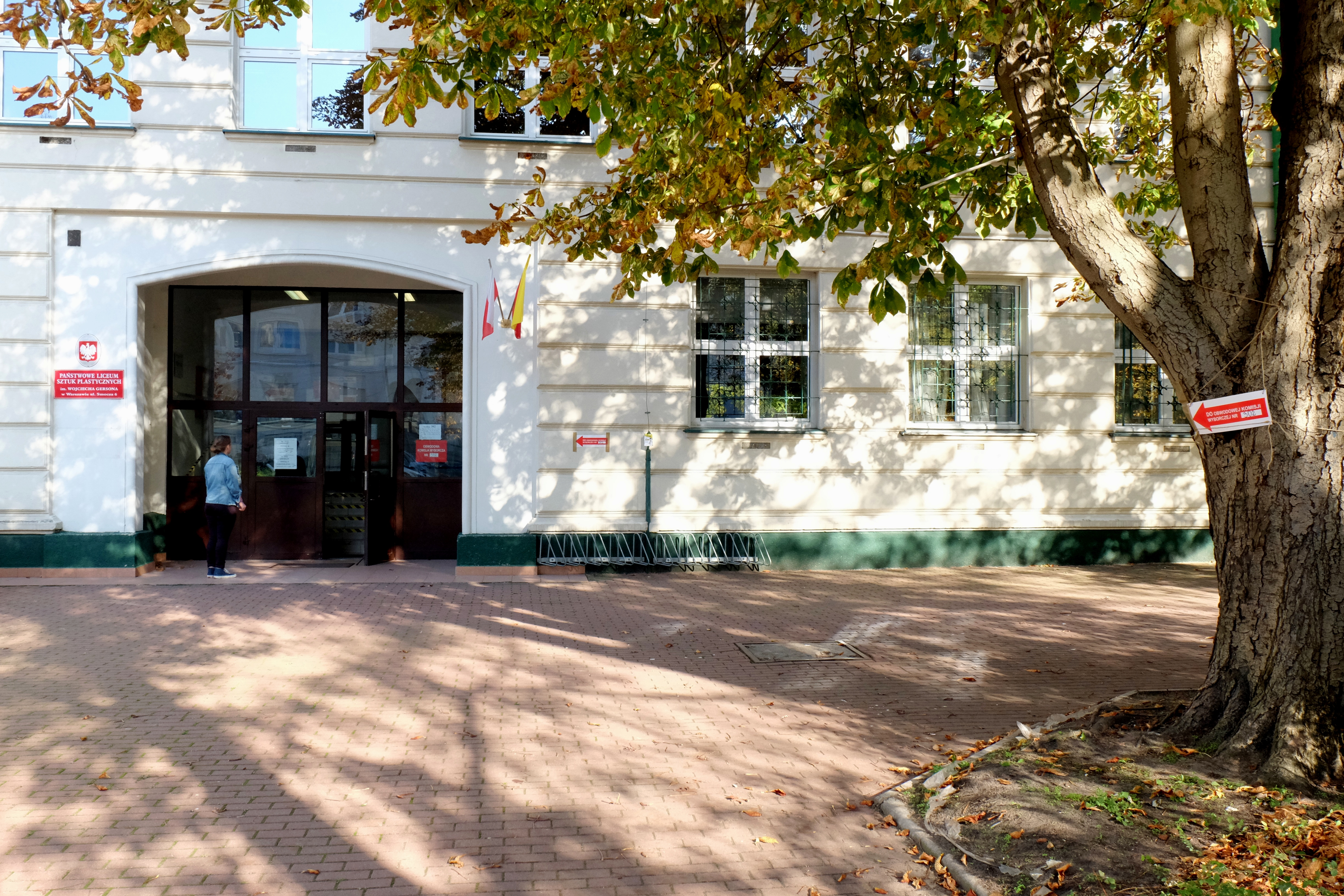 Wybory parlamentarne w Polsce w 2019; państwowa obwodowa komisja wyborcza w gmachu Zespołu Państwowych Szkół Plastycznych im. Wojciecha Gersona w Warszawie